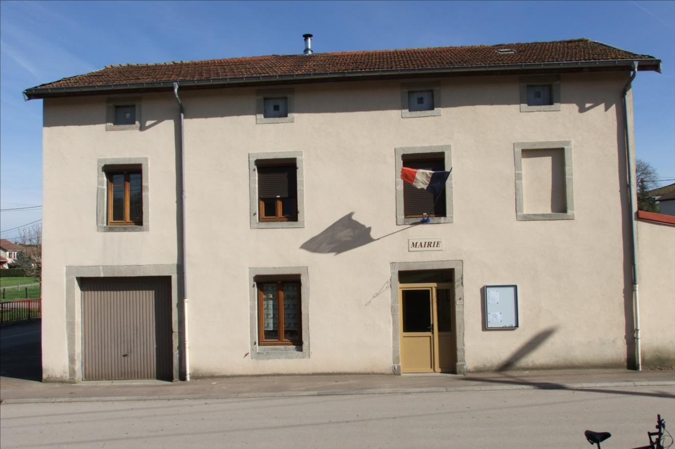 Le âtiment, construit en 1834 accueillait l'école primaire.